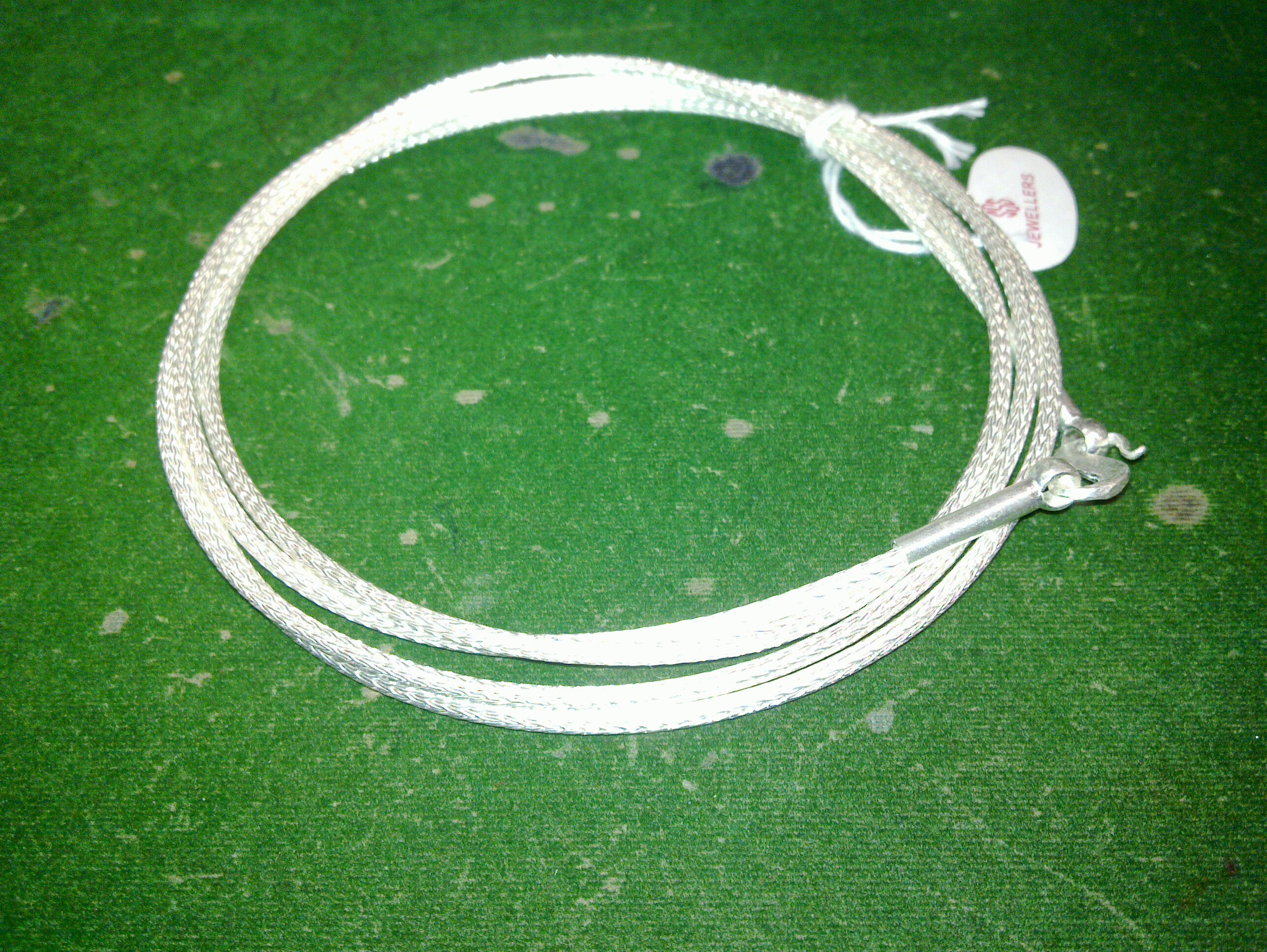 ஆண் குழந்தைகளுக்கான அரைஞாண்